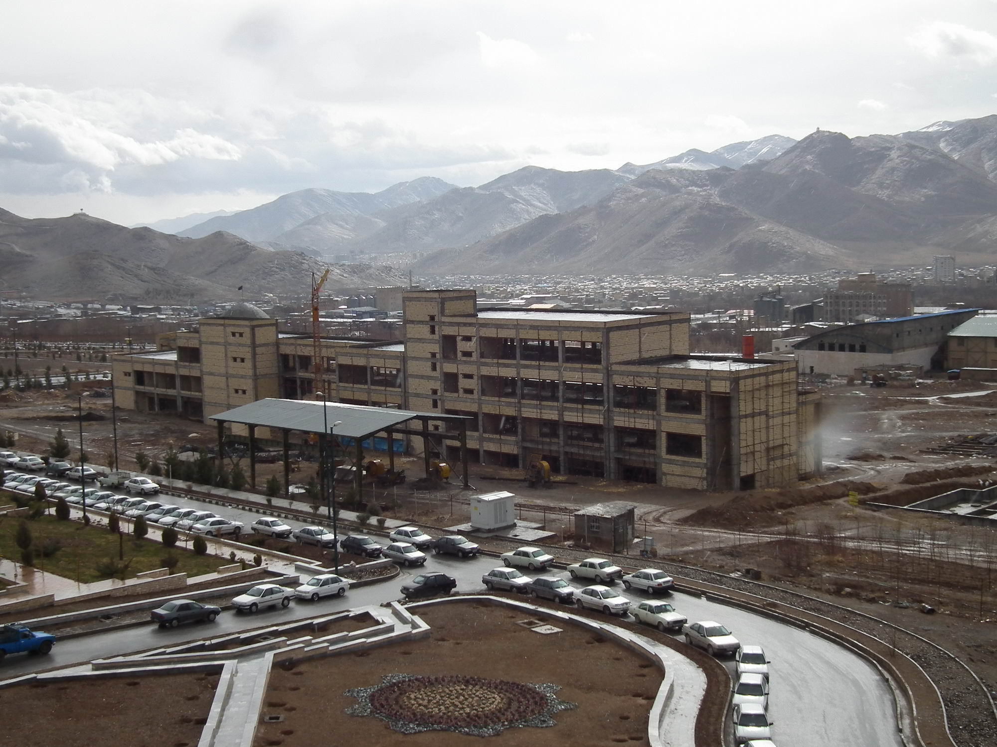 ساختمان نمازخانه و سالن اجتماعات در دست ساخت دانشگاه اراک